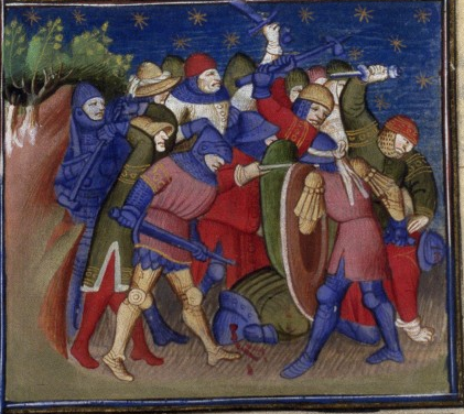 Bataille de Mérom